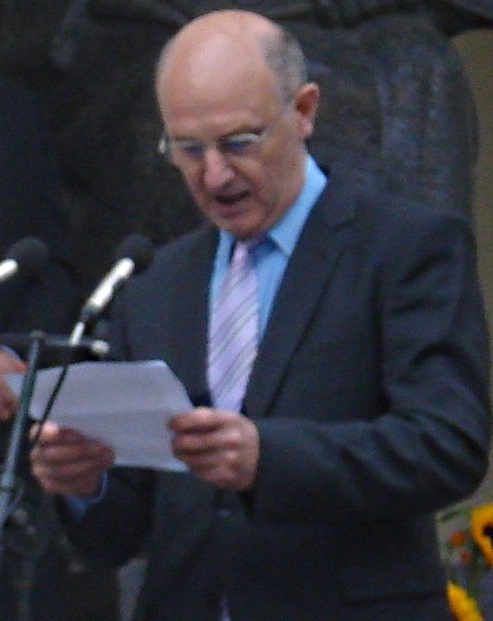 Домас Каунас (род. 1949), литовский книговед, библиофил, исследователь культуры Малой Литвы, профессор, на открытии памятника Донелайтису (1 сентября 2014 года)